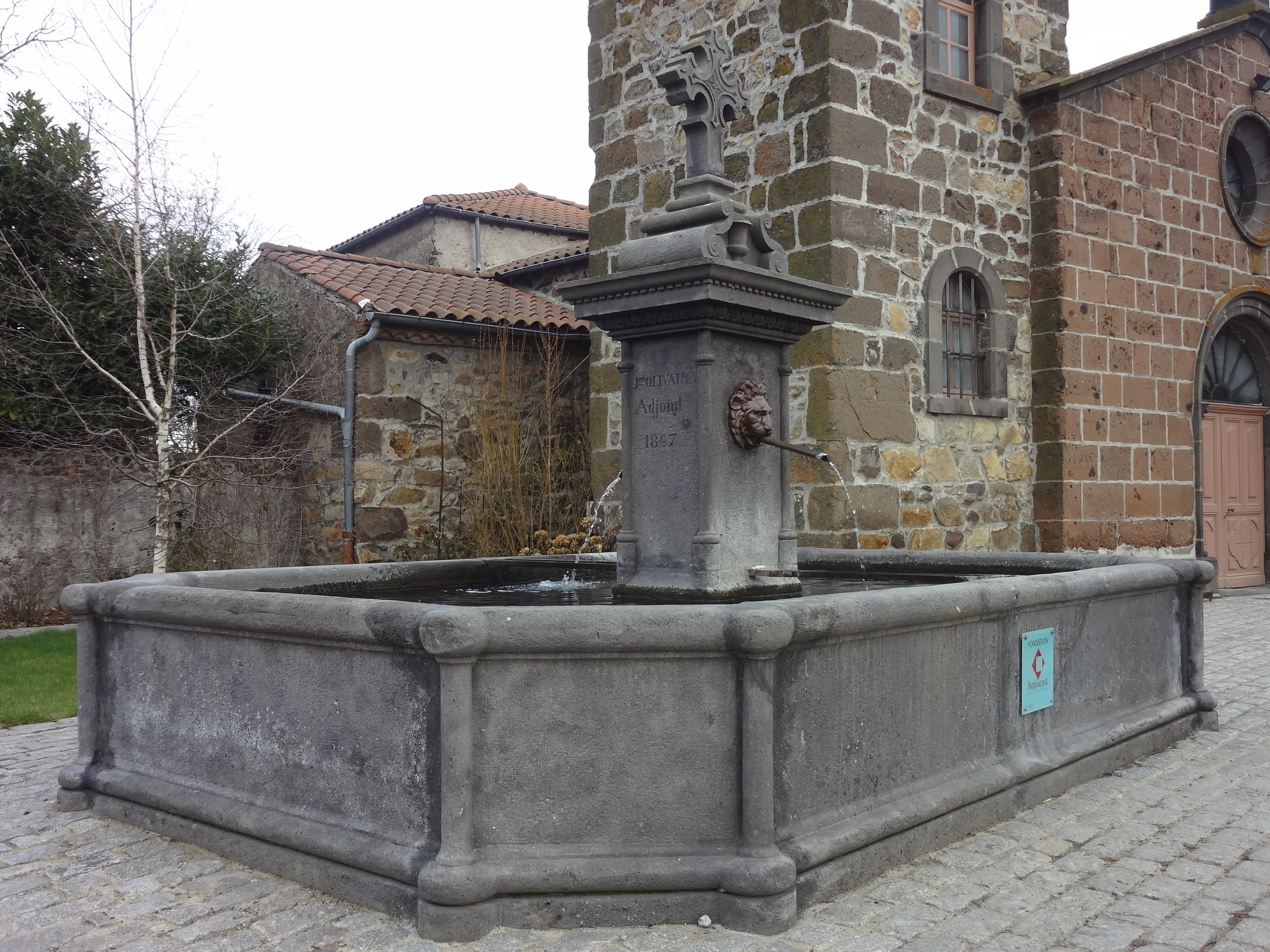 Fontaine ancienne au village, chronogramme 1867